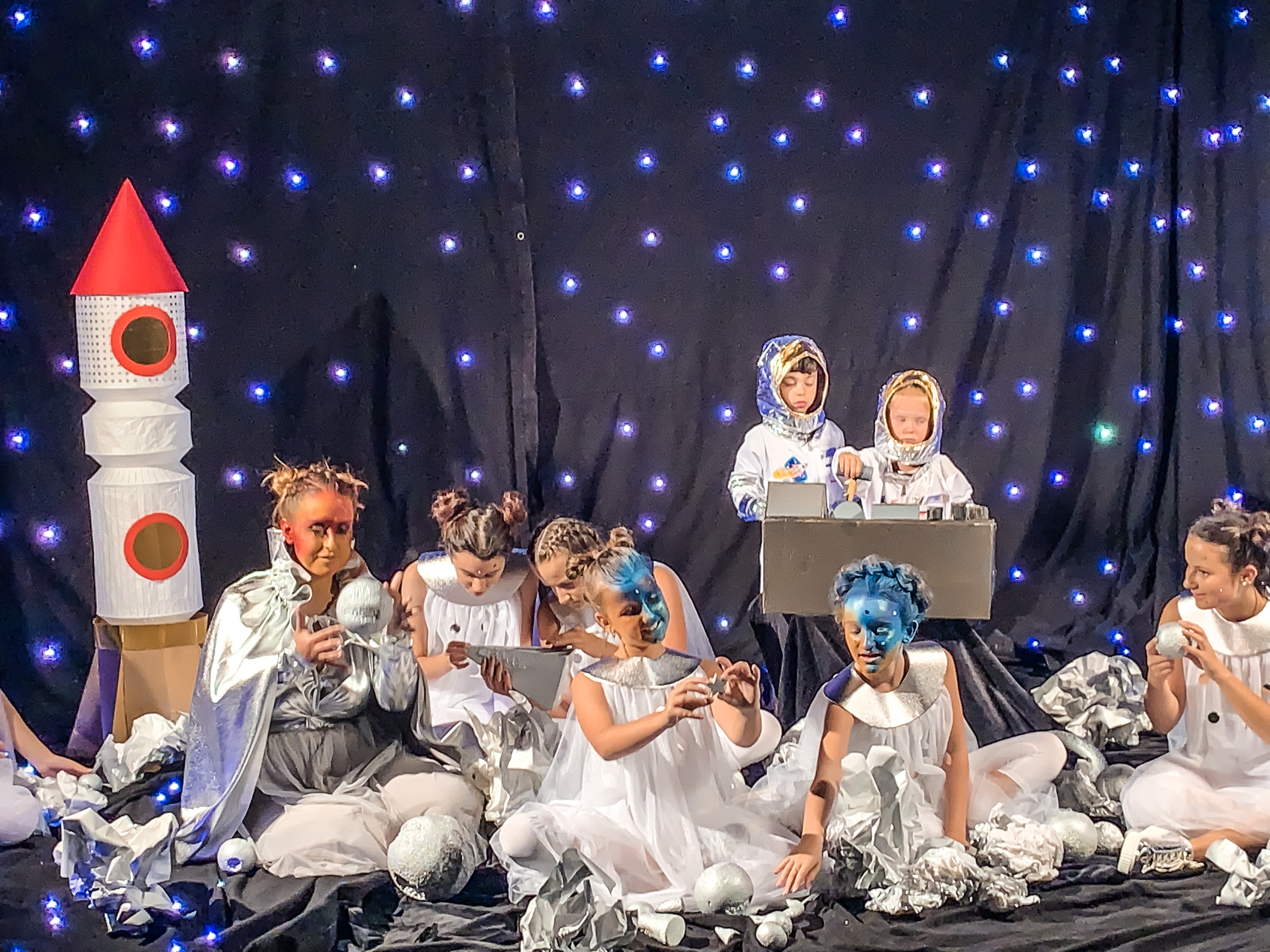 Superdeti